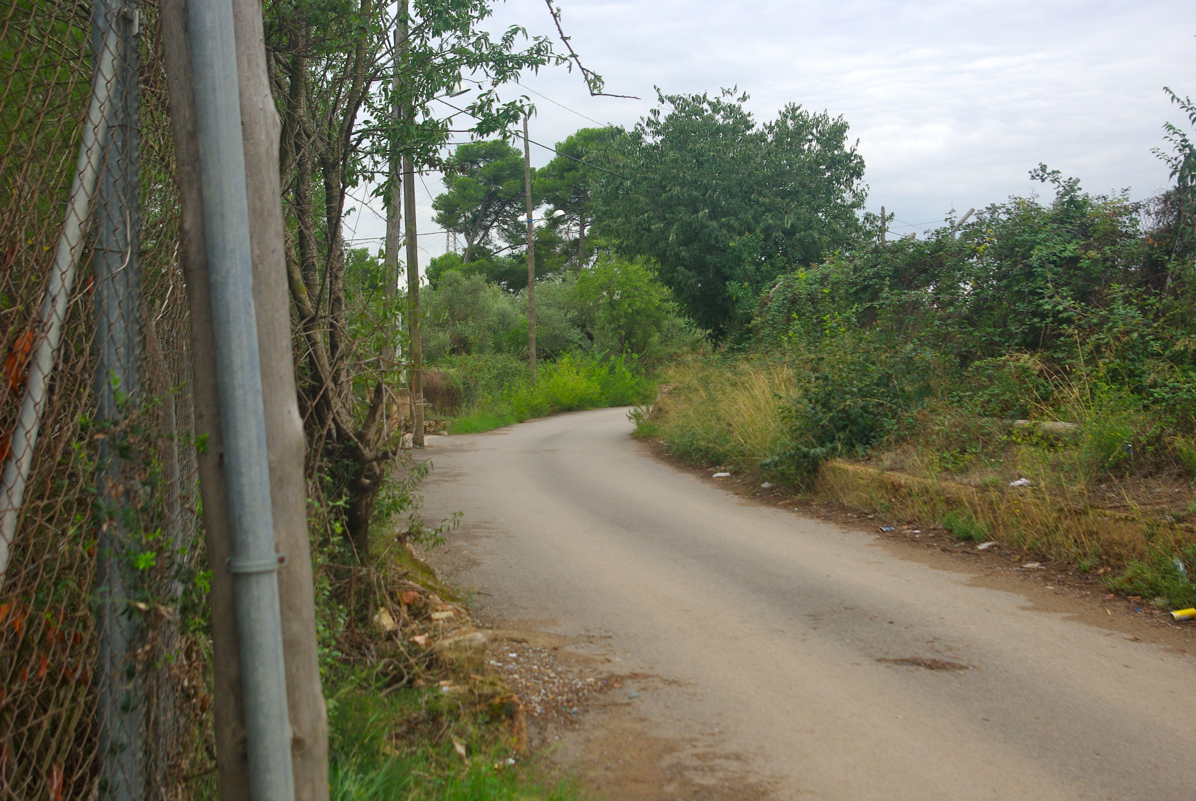 Camí dels Cinc Ponts prop de la Munta-i-baixa al terme de Reus